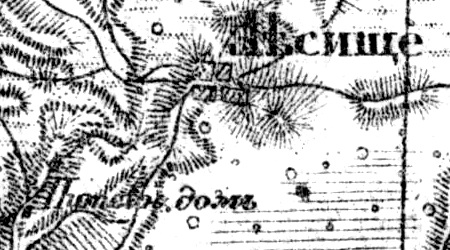 Деревня Лесище на карте 1919 года.